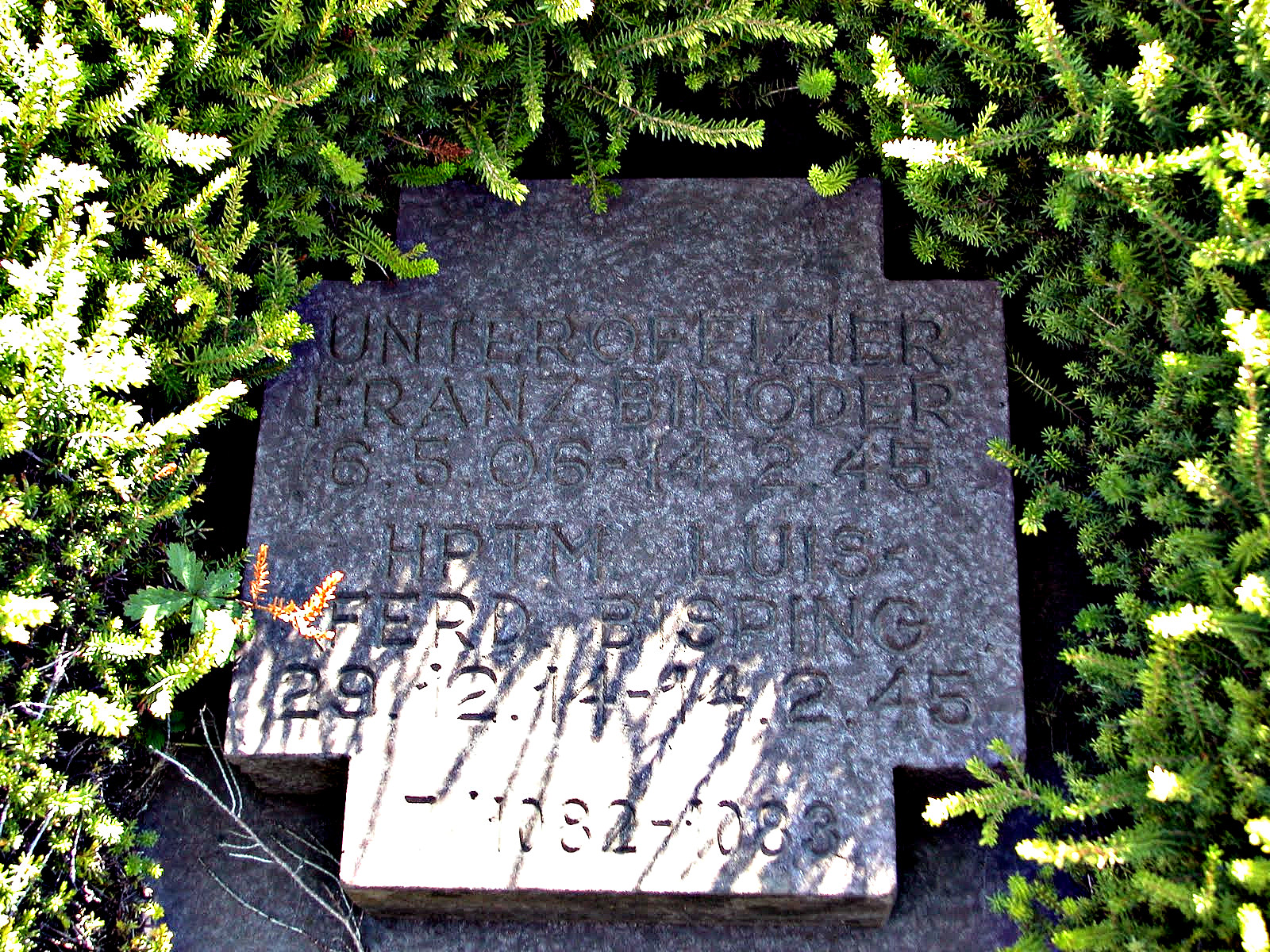 La tomba del Cap. Luis Ferdinand Bisping nel Cimitero di Costermano.